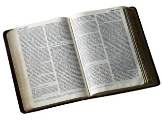 Bíblia